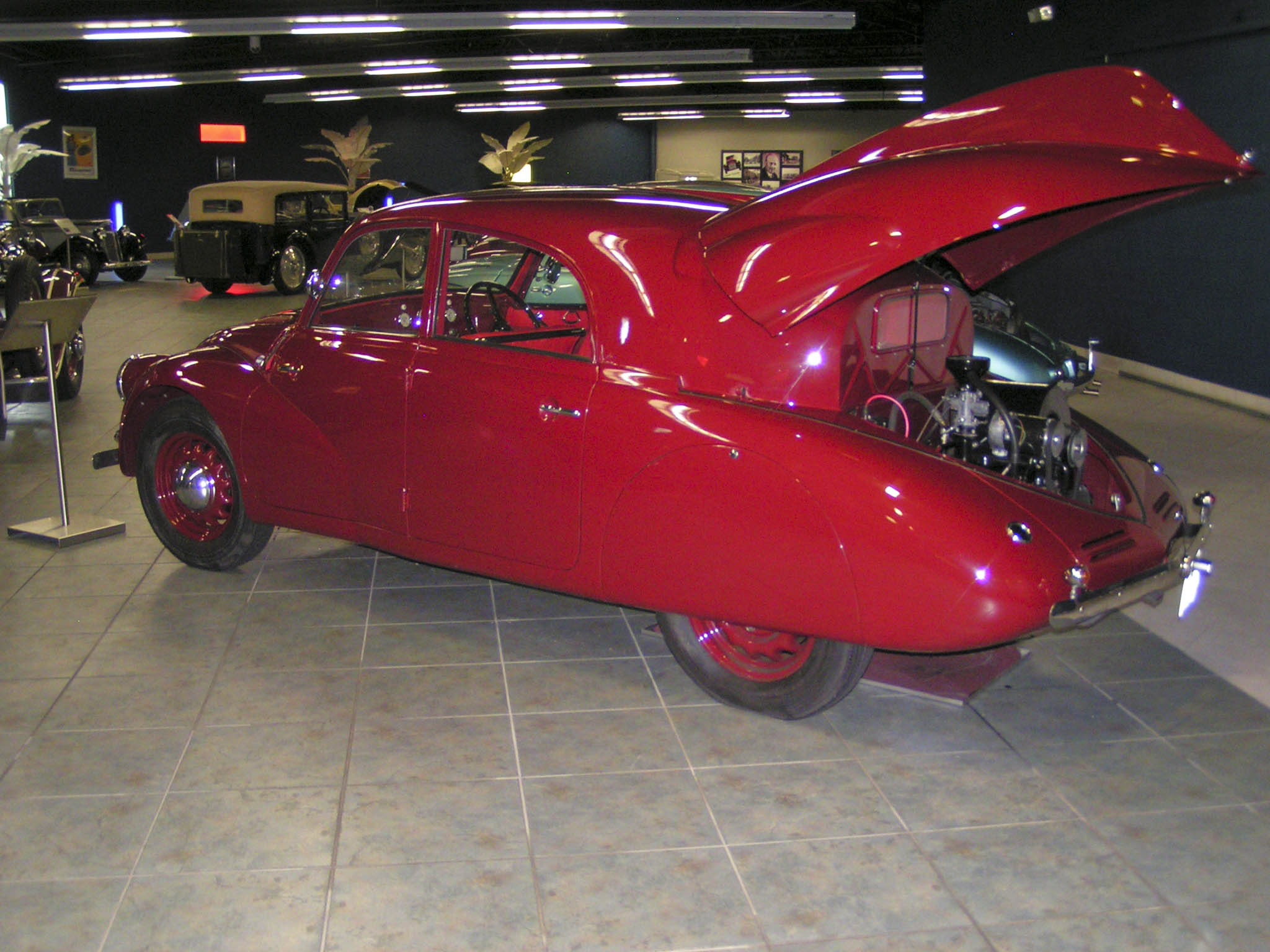 Tatra T97Tatra T97